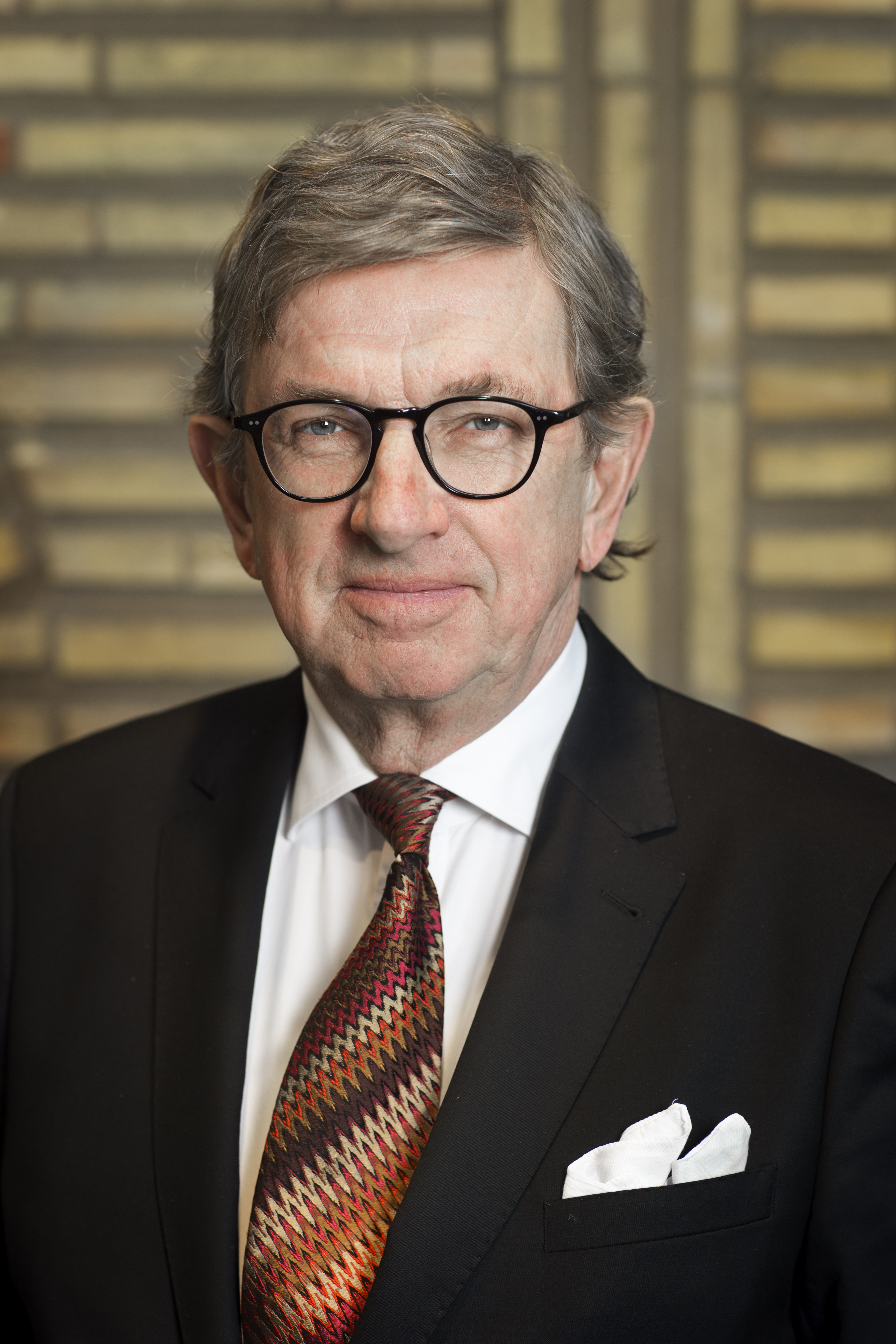 Affärsmannen Bengt Braun.